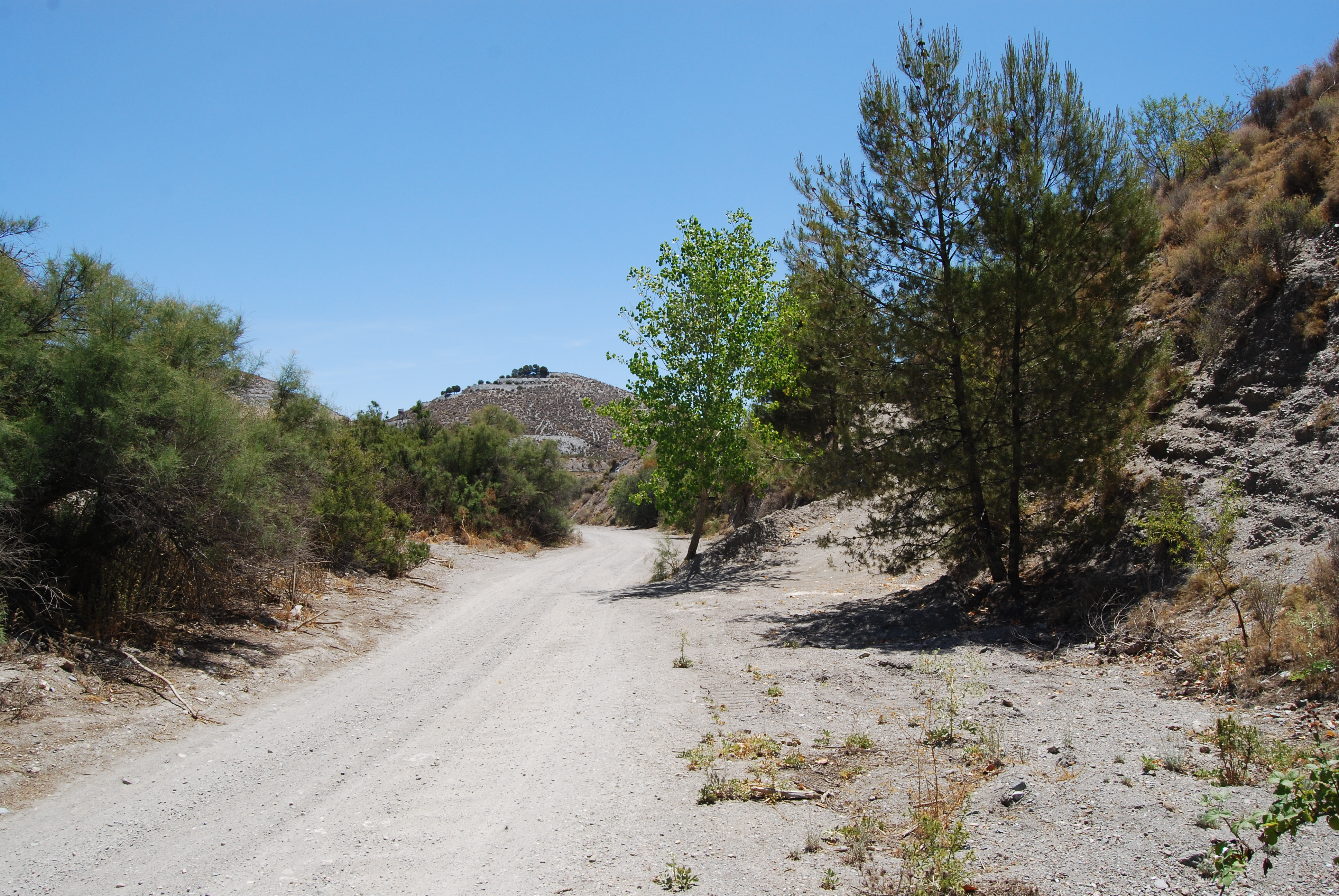 Vista de un olmo en la rambla